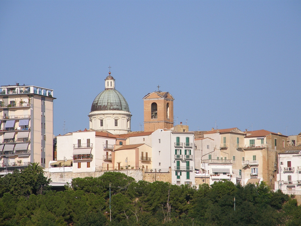 Ortona